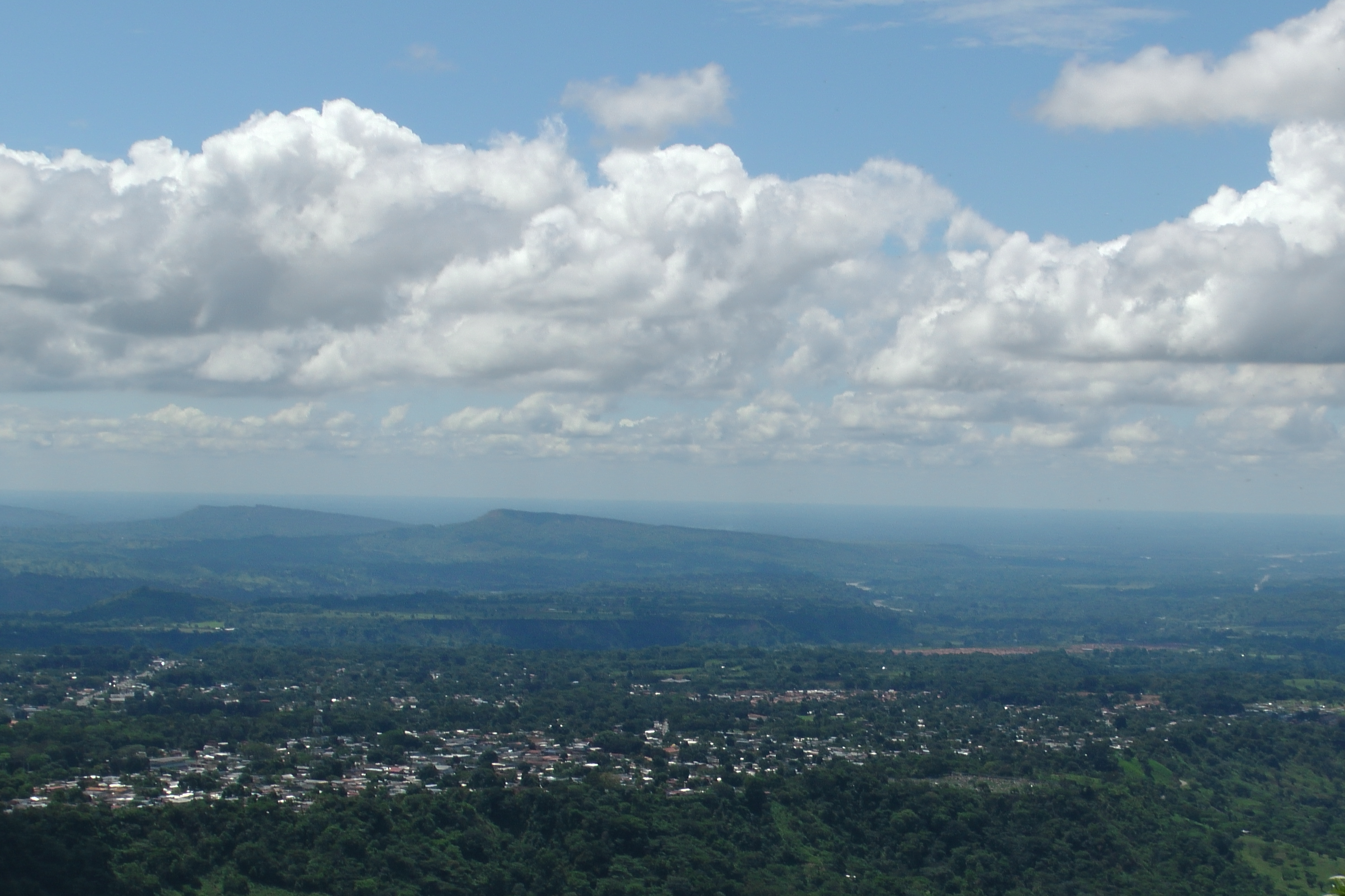 Desde Cerro Cacao, Estado Barinas